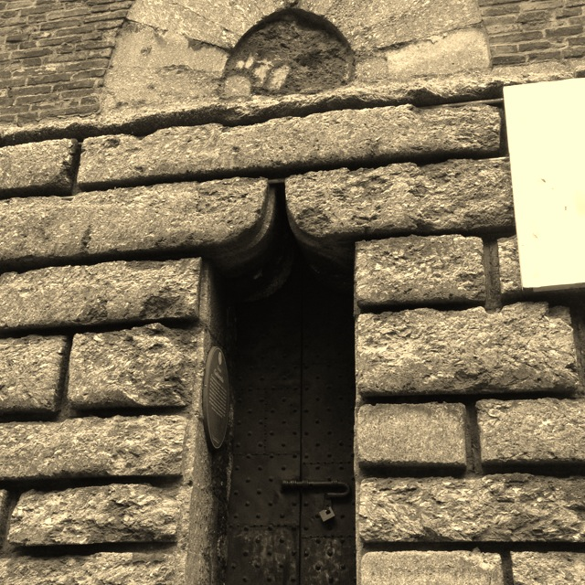 Bologna (Italy) - Torre della Garisenda: basamento in blocchi di selenite - MIBAC This is a photo of a monument which is part of cultural heritage of Italy.